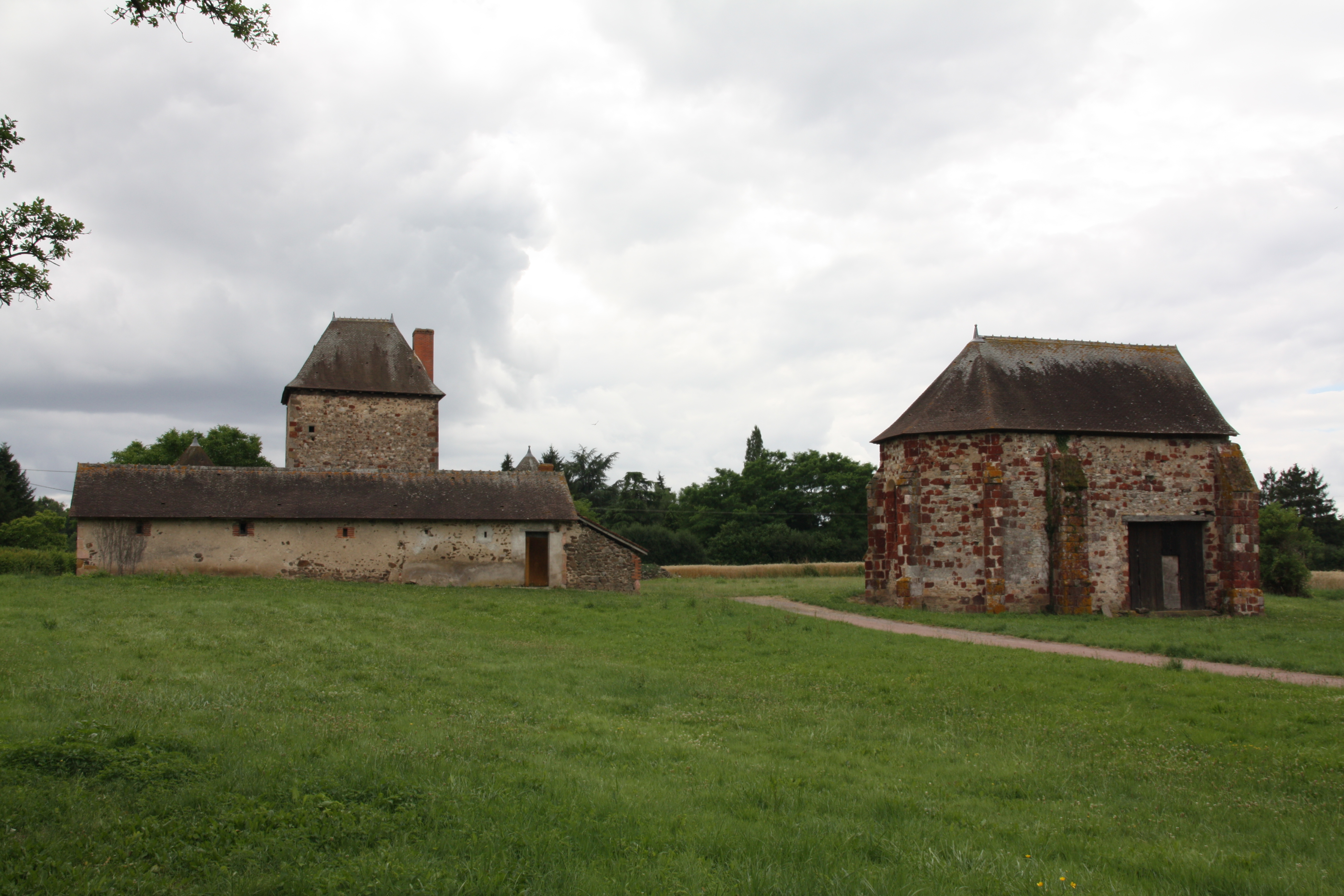 Ancien prieuré Notre-Dame à Reugny, France